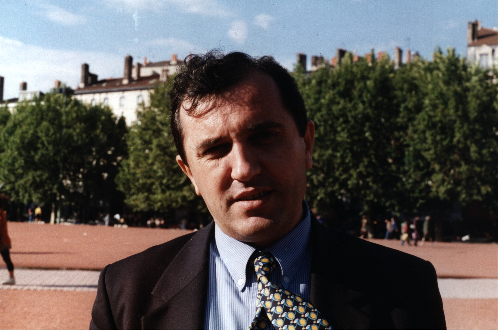 Besnik Mustafaj Place Bellecour à Lyon en septembre 1995